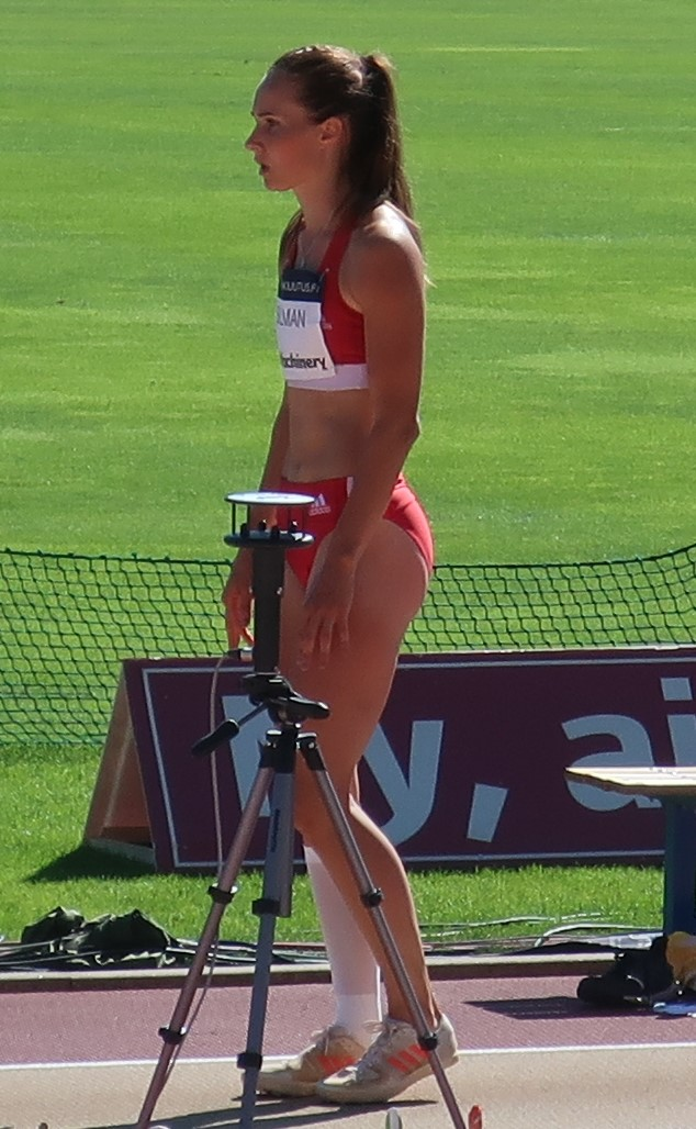 Miia Sillman valmistautumassa hyppyynsä naisten seitsenottelun pituushypyssä Kalevan kisoissa 2020.